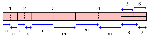 Cutting Tanmono to make Kimono.